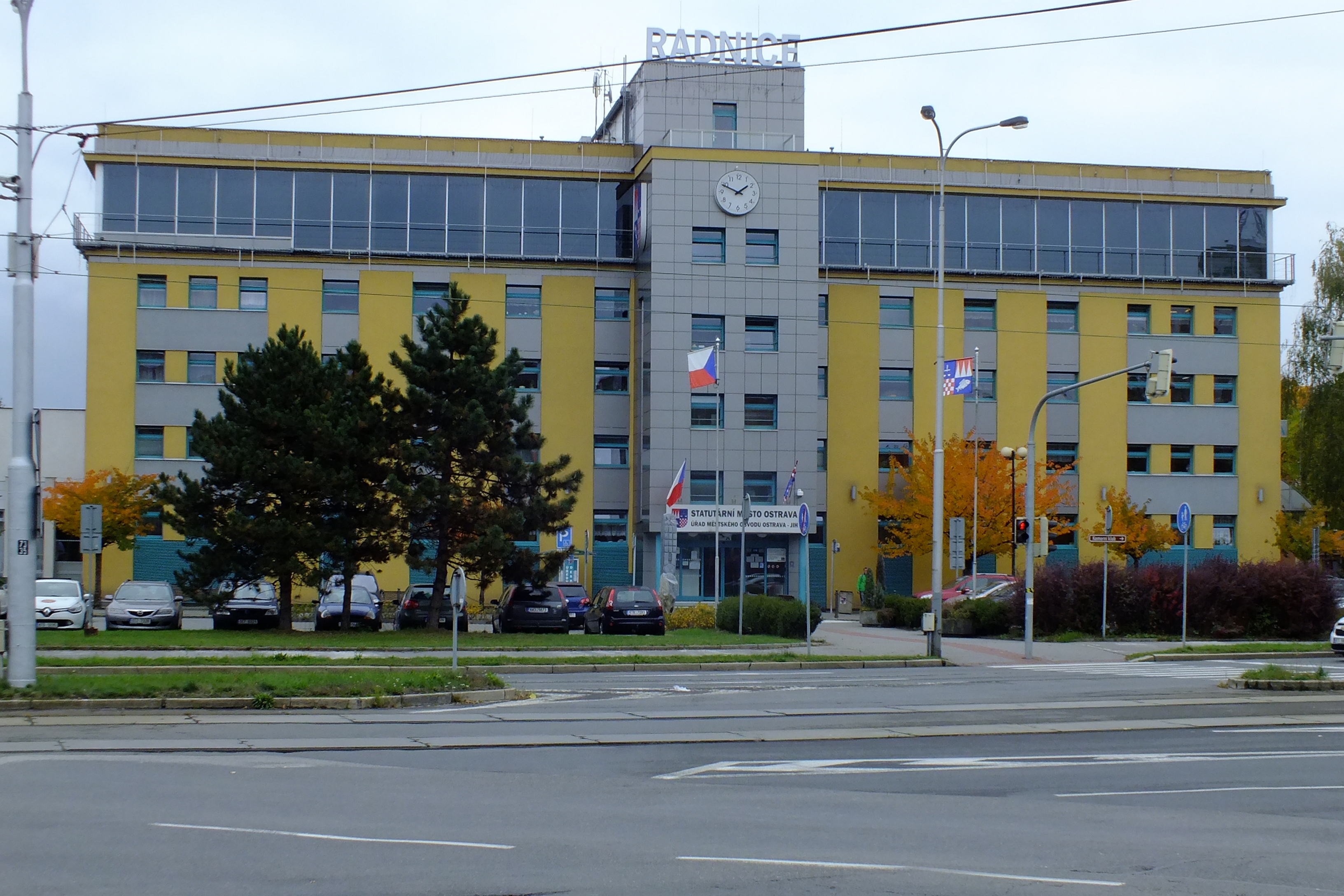 Radnice městského obvodu jih